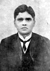 Taken from Prakasam's Autobiography Naa jIvita yAtra. This low resolution image comes under fair use rationale. According to Indian copyright law even the copy right might have expired as the photo might be more than 100 years old